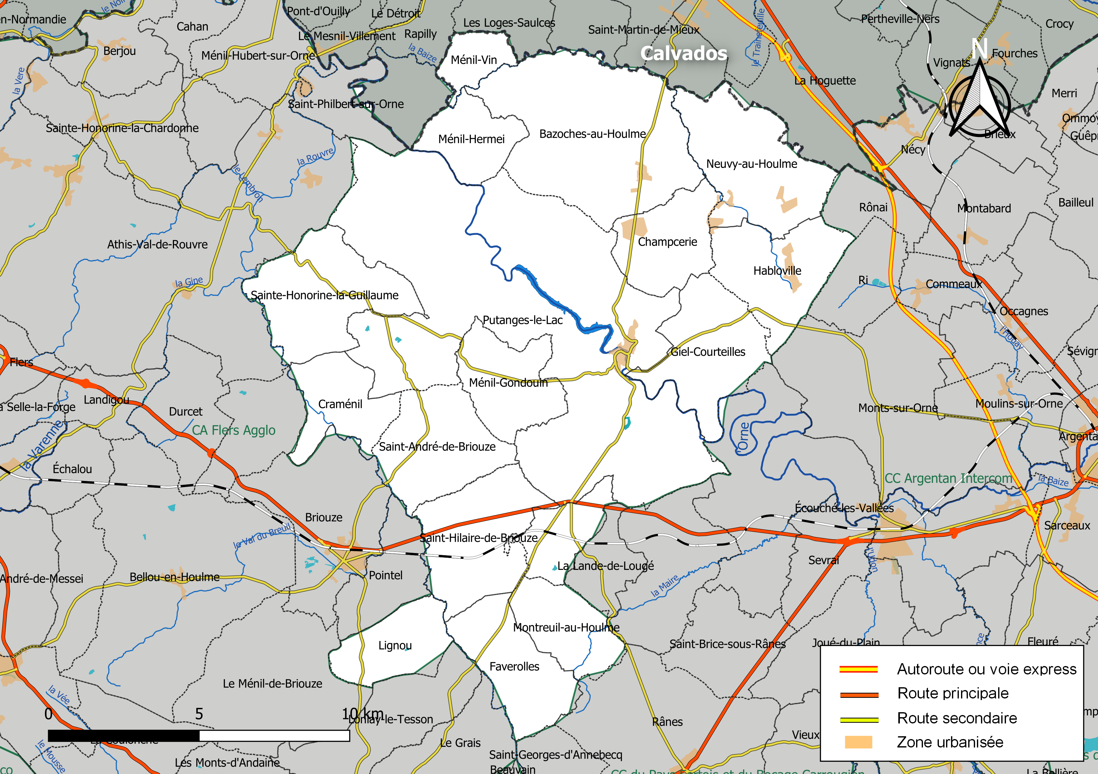 Carte géographique de la Communauté de communes du Val d'Orne, département de l'Orne, France. Composition au 1er janvier 2019.